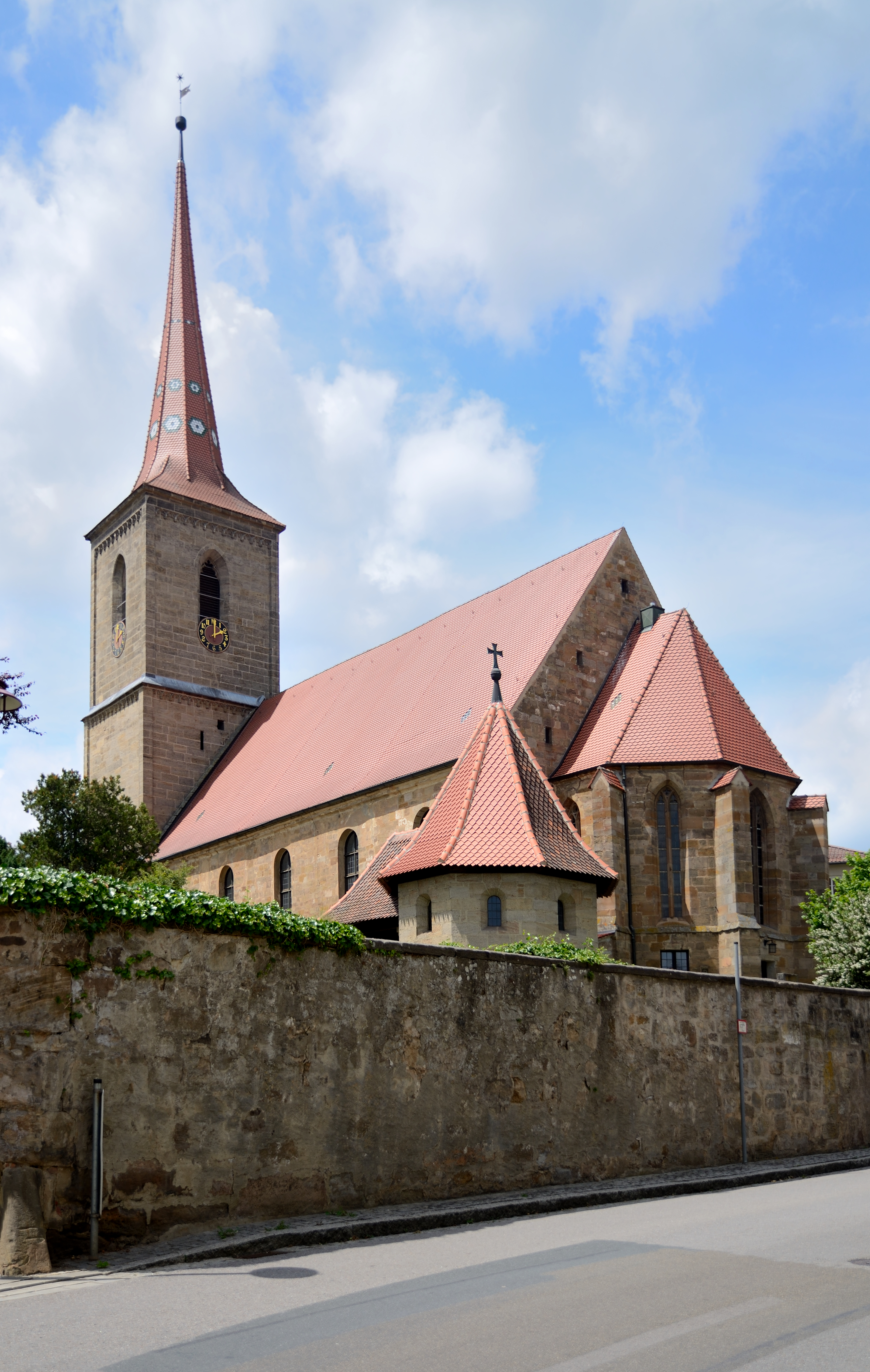 St. Albanskirche in Sachsen bei Ansbach